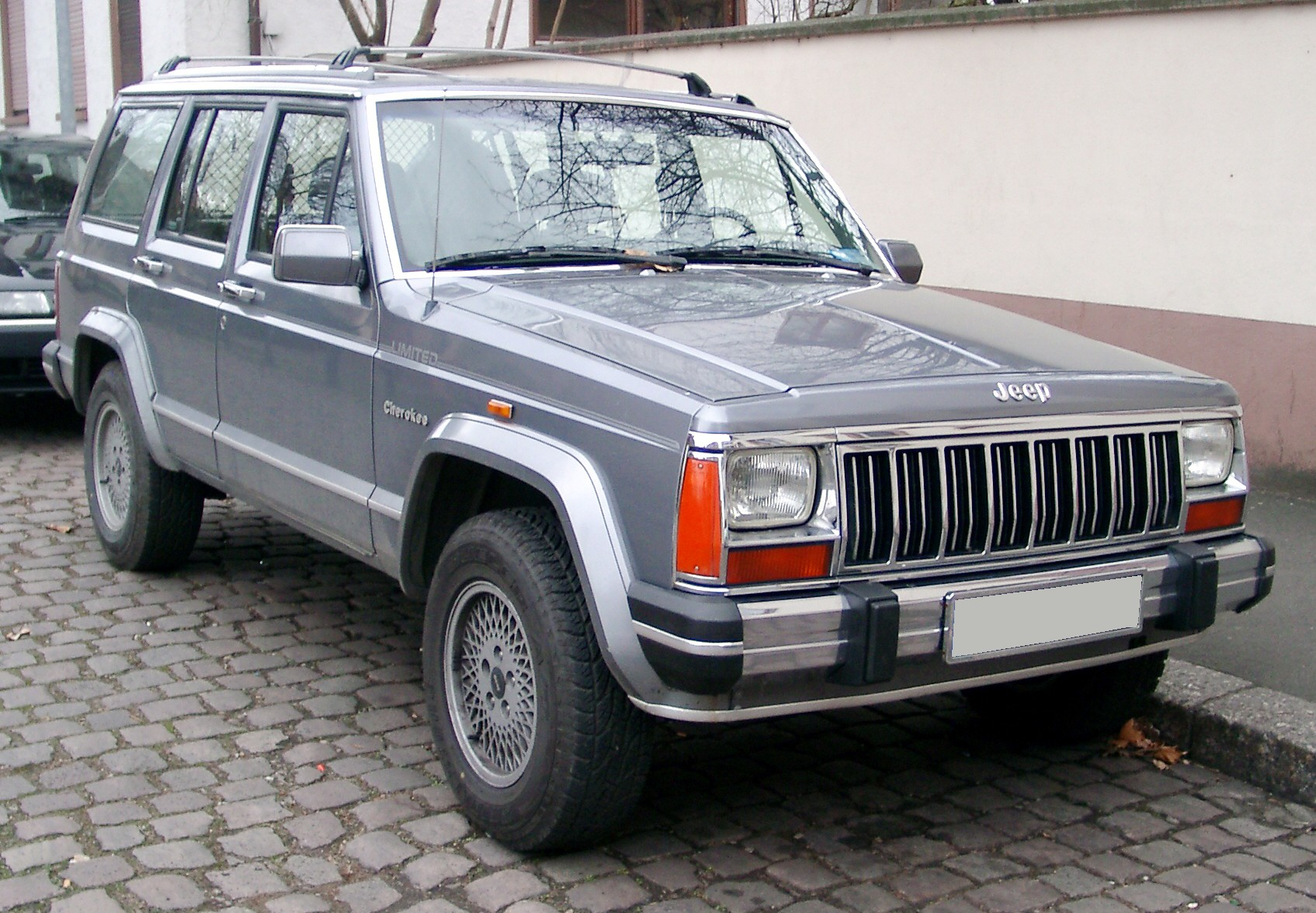 Jeep Cherokee